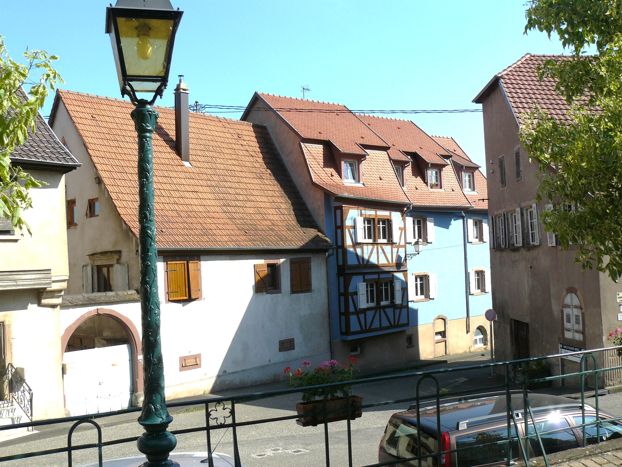 La rue principale à Bernardswiller